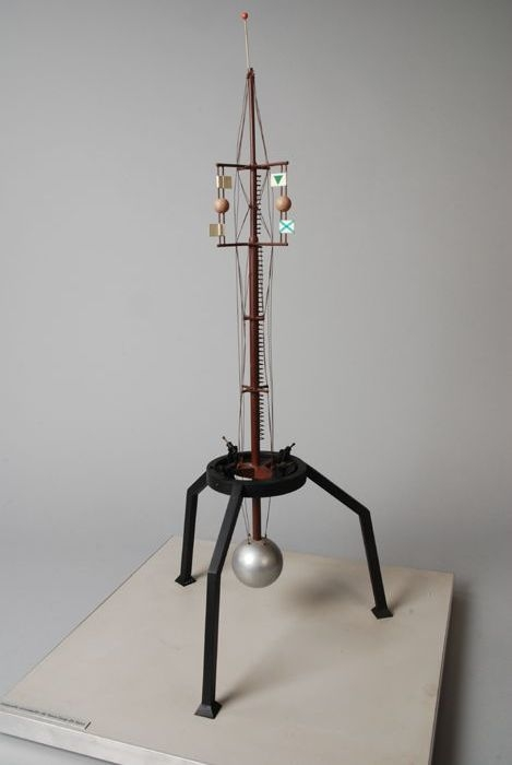 Model van de veertig meter hoge Aeolusmast, een kunstwerk dat in 1955 was geplaatst aan de Westzeedijk te Rotterdam ter gelegenheid van de tentoonstelling E55. Het ontwerp is van Arie Jansma. De oorspronkelijke mast, van ongeveer 40 meter hoog, is in 1967 verkocht aan een schroothandelaar. Dit staat in de publicatie "Beelden, stadsverfraaing van Rotterdam sinds 1940", van Siebe Thissen.